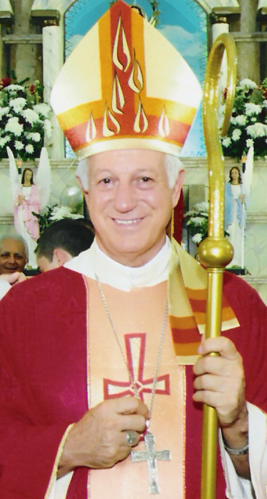 Dom Mariano Manzana, bispo atual da Diocese de Mossoró, Rio Grande do Norte, Brasil.